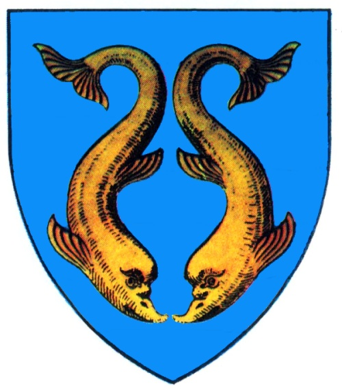 Dobrudja CoA